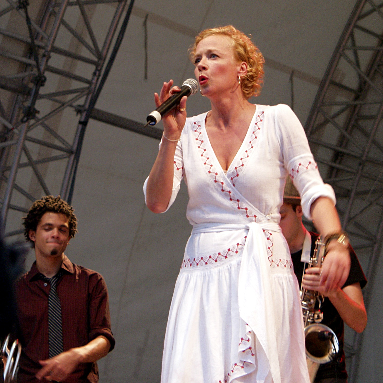 Katja Riemann zusammen mit den Brothers Keepers auf dem Deutschen Evangelischen Kirchentag 2007 während der Veranstaltung „Die Macht der Würde: Globalisierung neu denken. Ruf an den G8-Gipfel in Heiligendamm“.